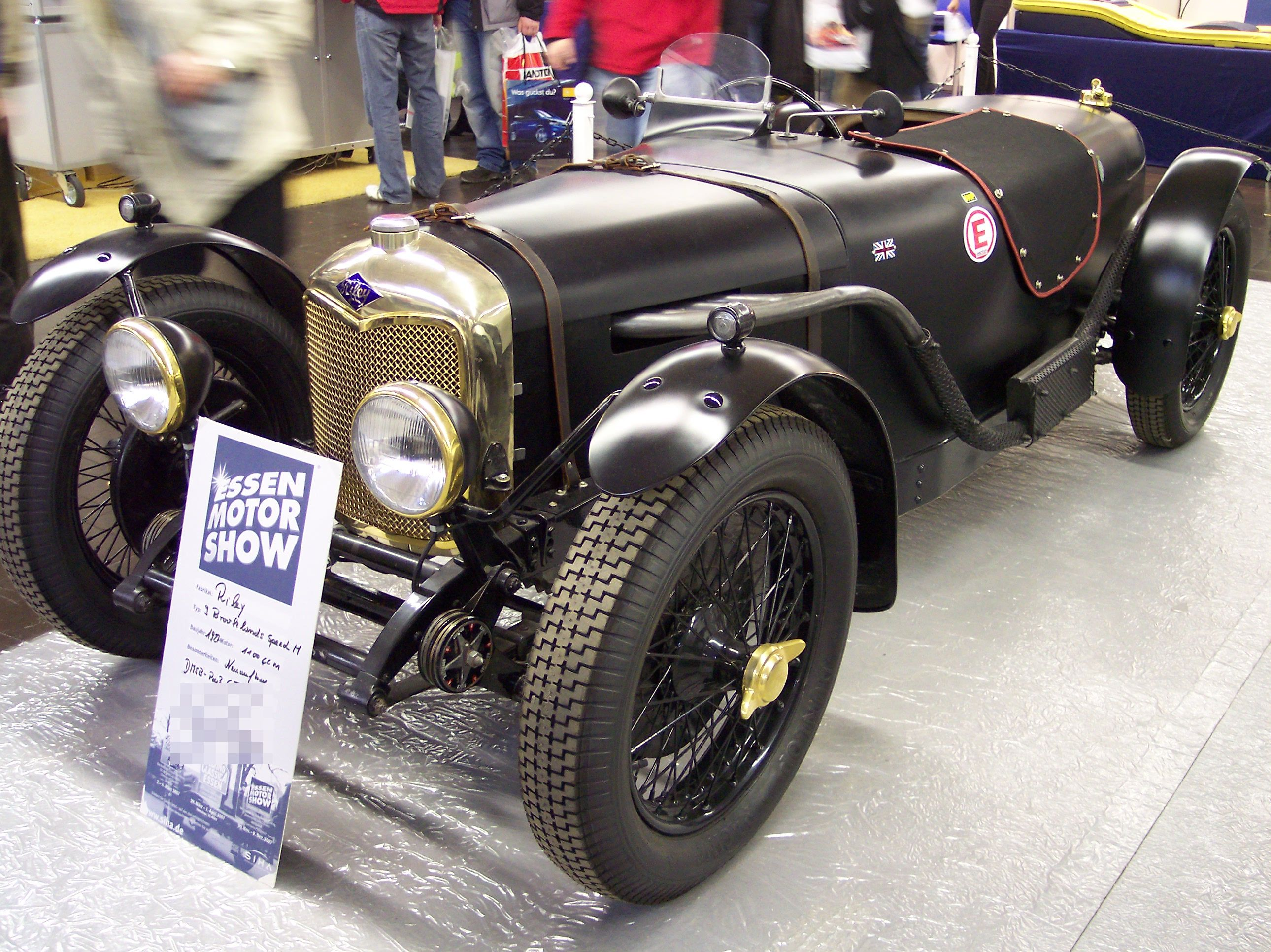 Source: Eigenes Bild